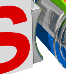 Pole "shoe" Polschuh